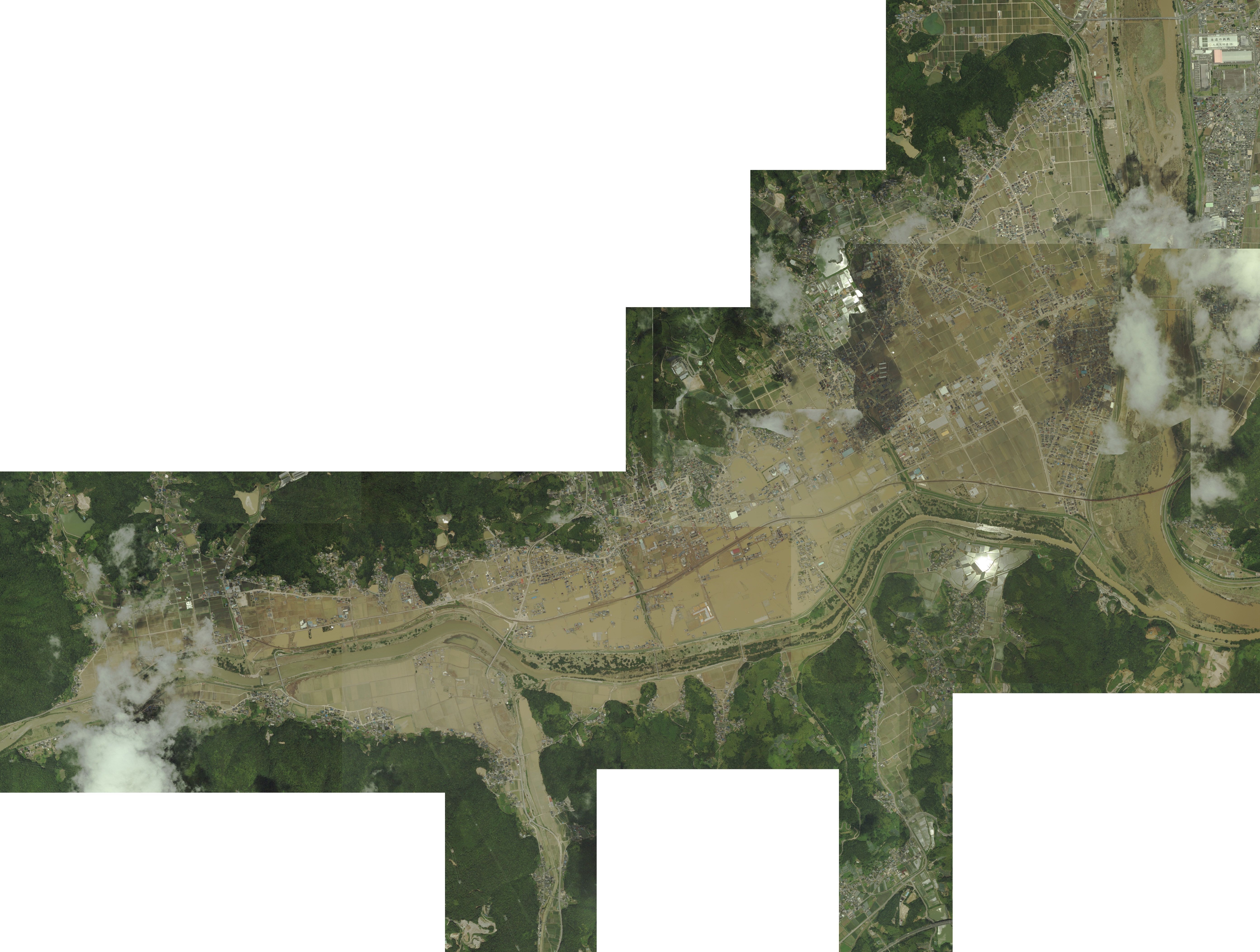 平成30年7月豪雨による真備地区の被害を上空から撮影したもの。